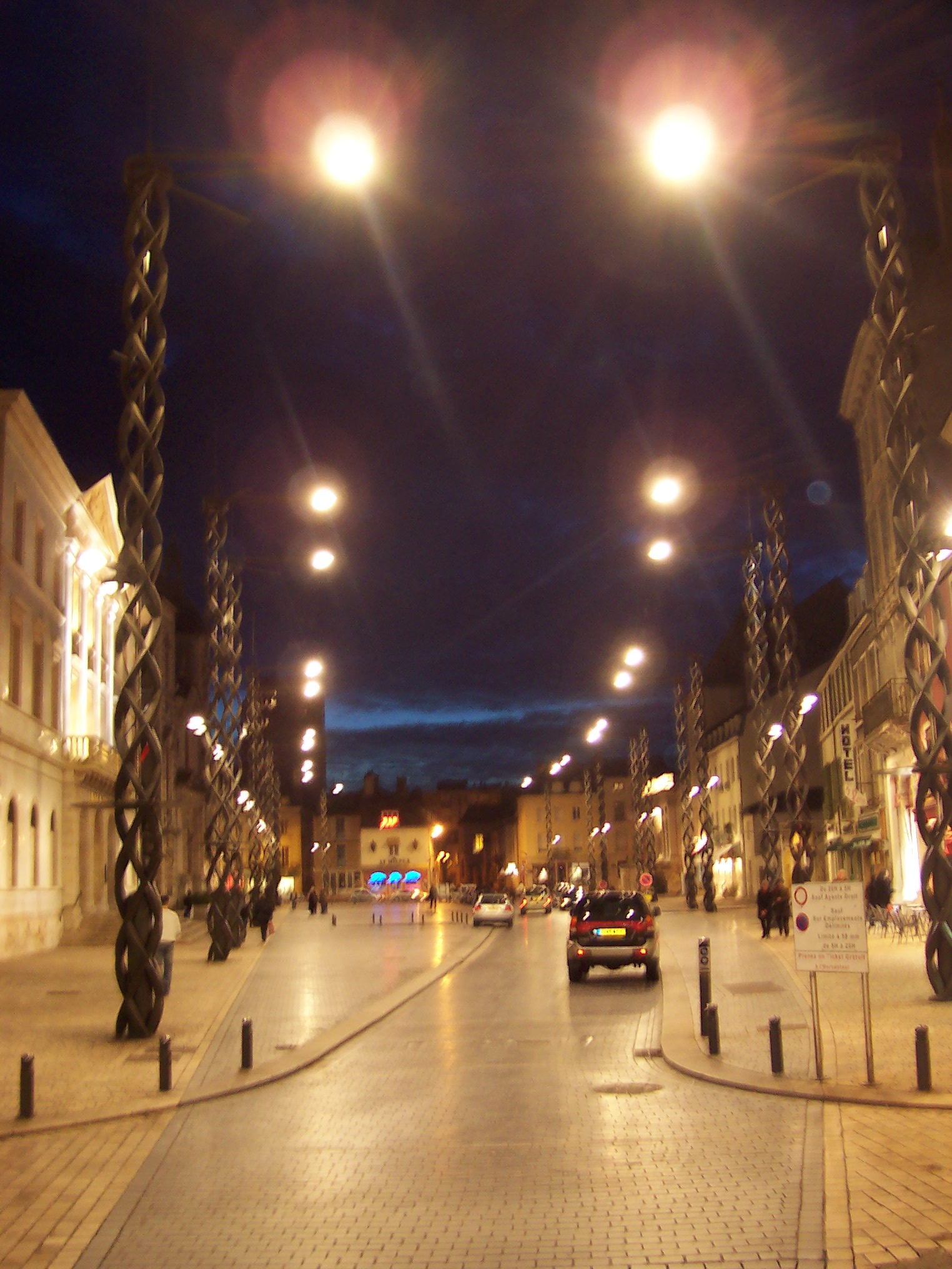 Place de la Mairie de Chalon-Sur-Saône (71) de nuit.